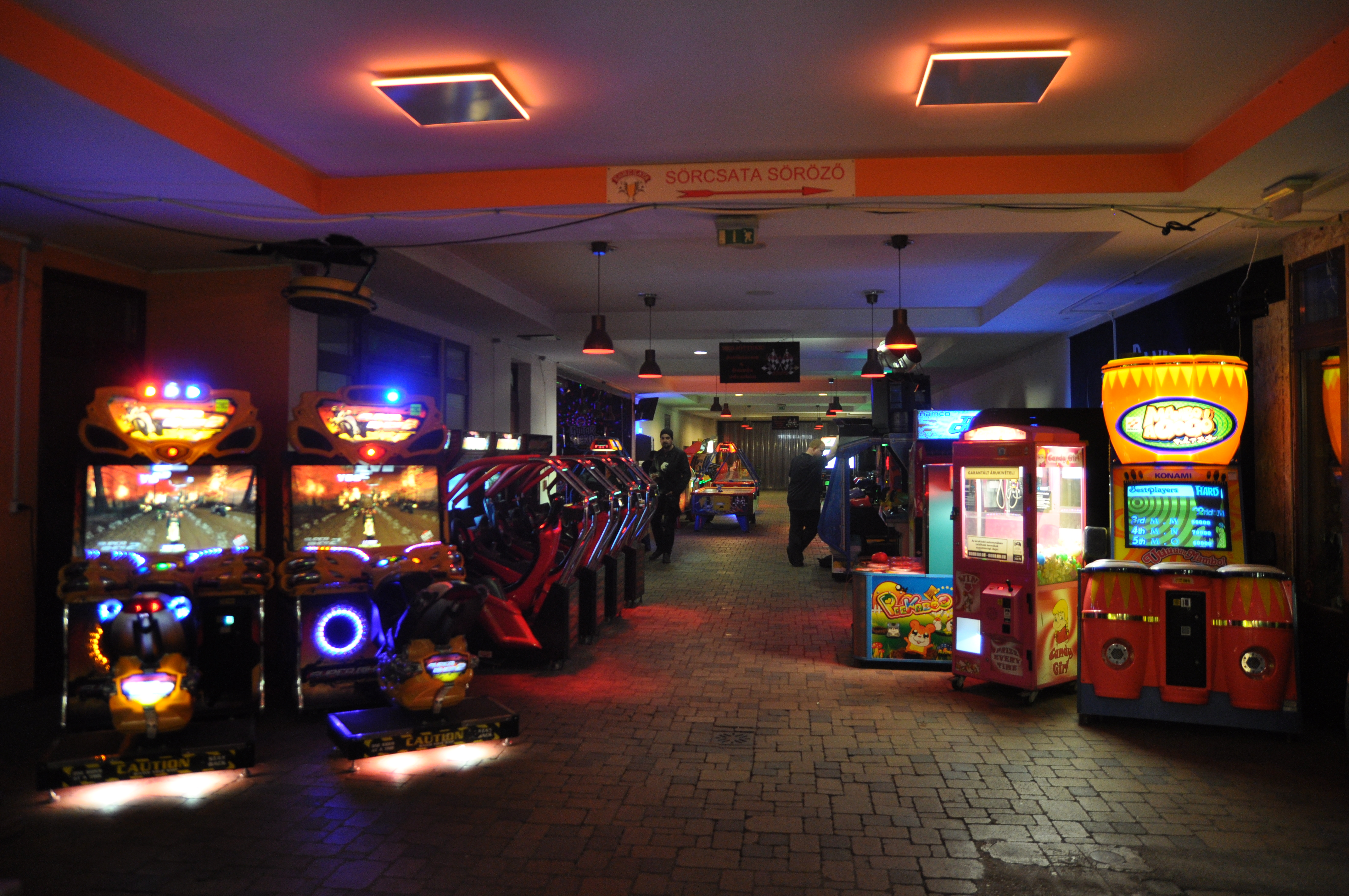 Budapest, Holló u. 6, Gozsdu játékterem